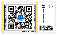 Interaktive Briefmarke mit QR-Code, Erstausgabe am 01.04.2012